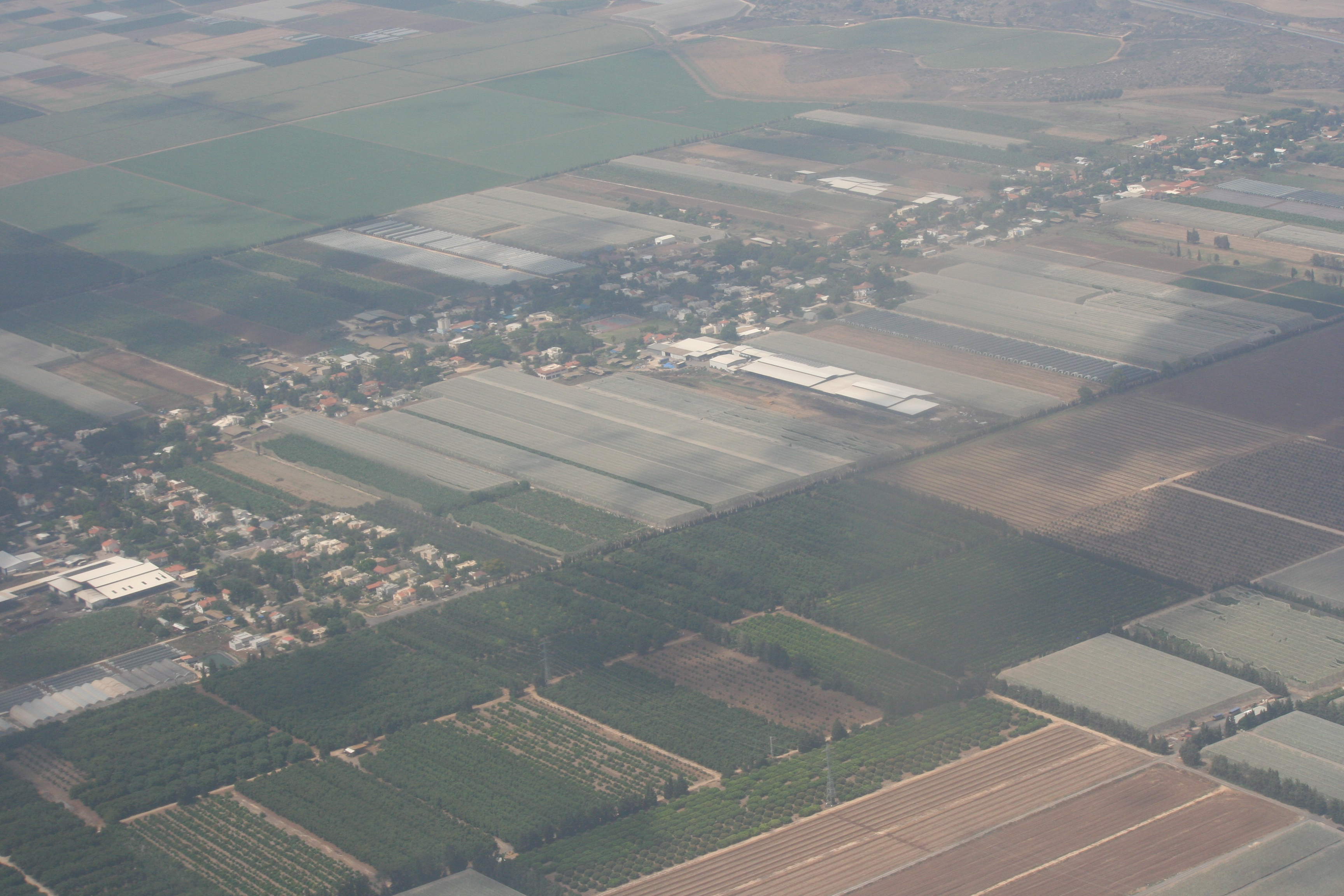 מושב עין איילה